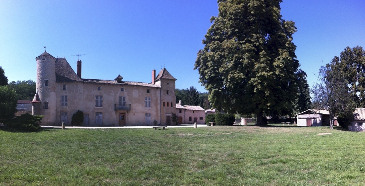 Vue prise du parc